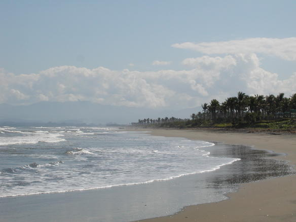 Buguey, Cagayan, Philippines